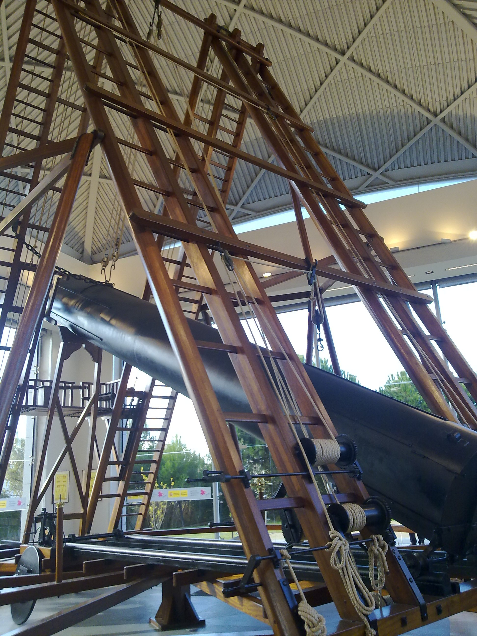 Reconstrucción del telescopio histórico principal con un espejo de 60 cm de diámetro, obra de William Herschel, del Real Observatorio de Madrid. Exposición histórica.